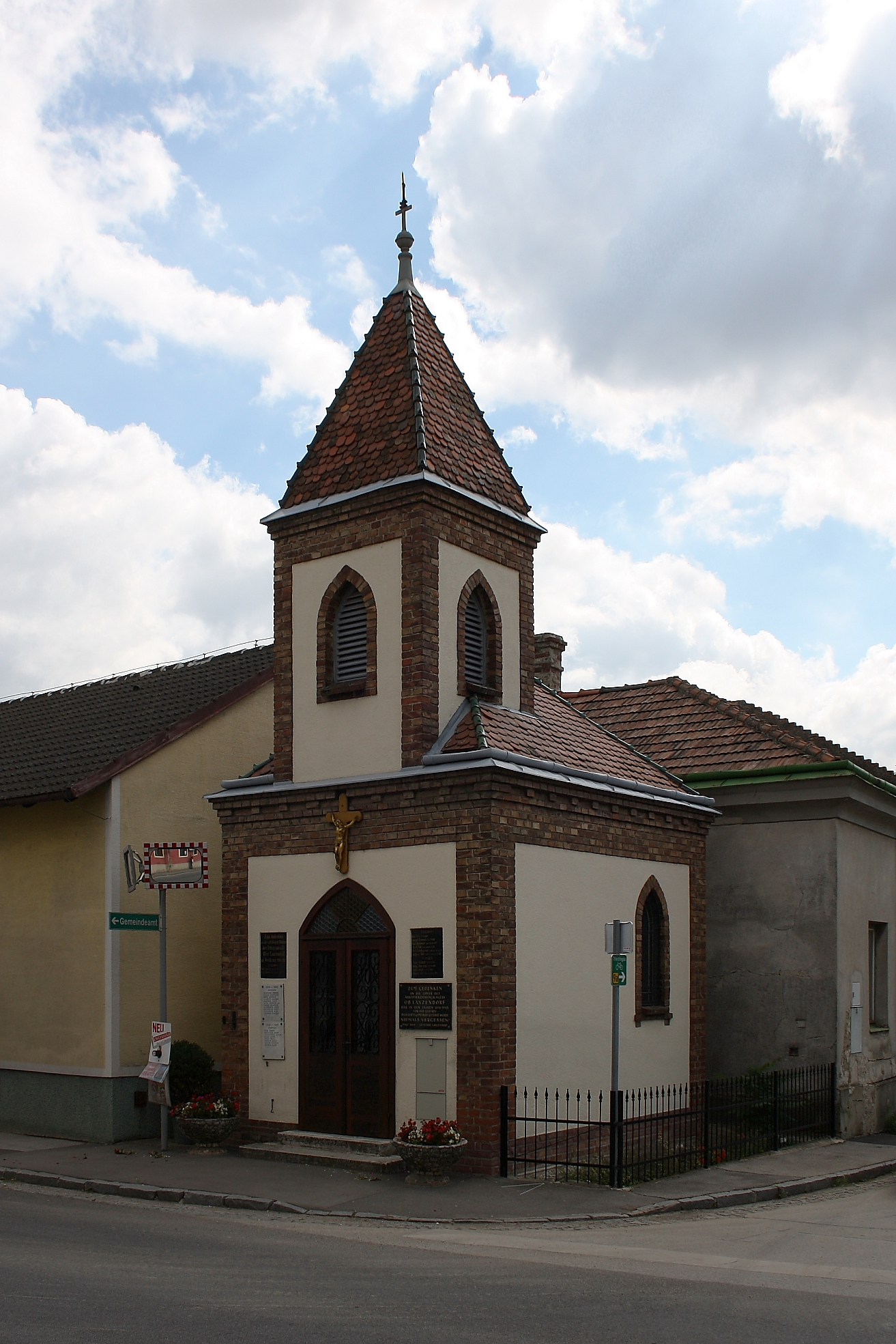 Kapelle in Oberlanzendorf, einer Katastralgemeinde der niederösterreichischen Gemeinde Lanzendorf.